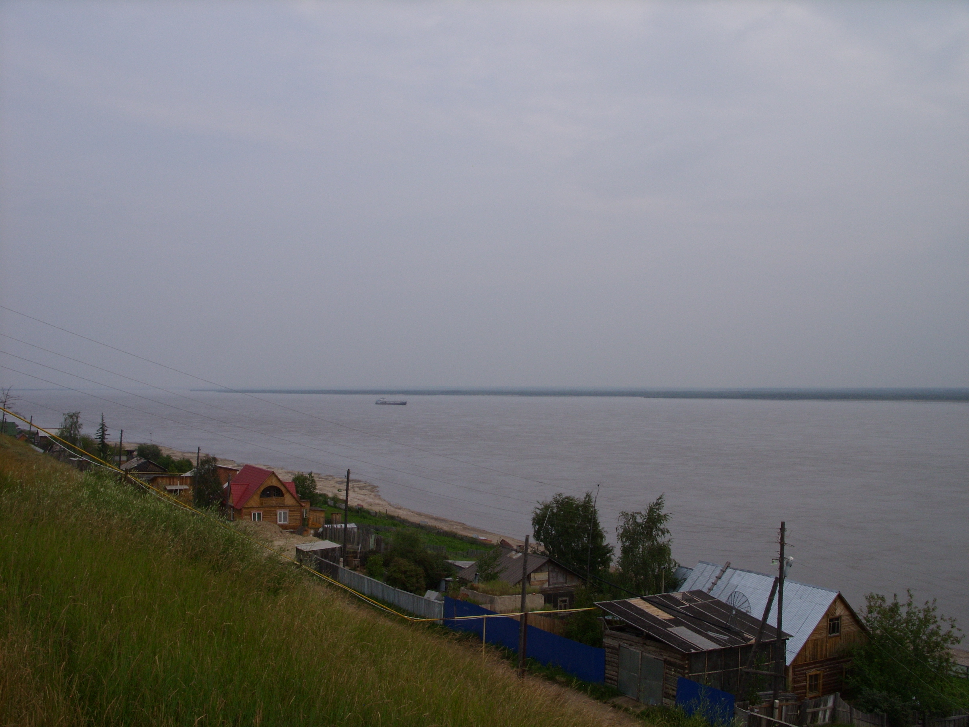 г. Покровск, Хангаласский район, Якутия